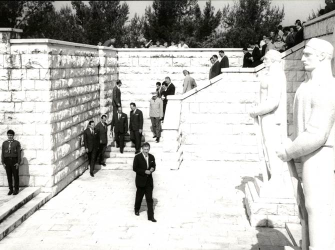 Tito polaže venac na spomeniku Partizanu-borcu 1969. godine